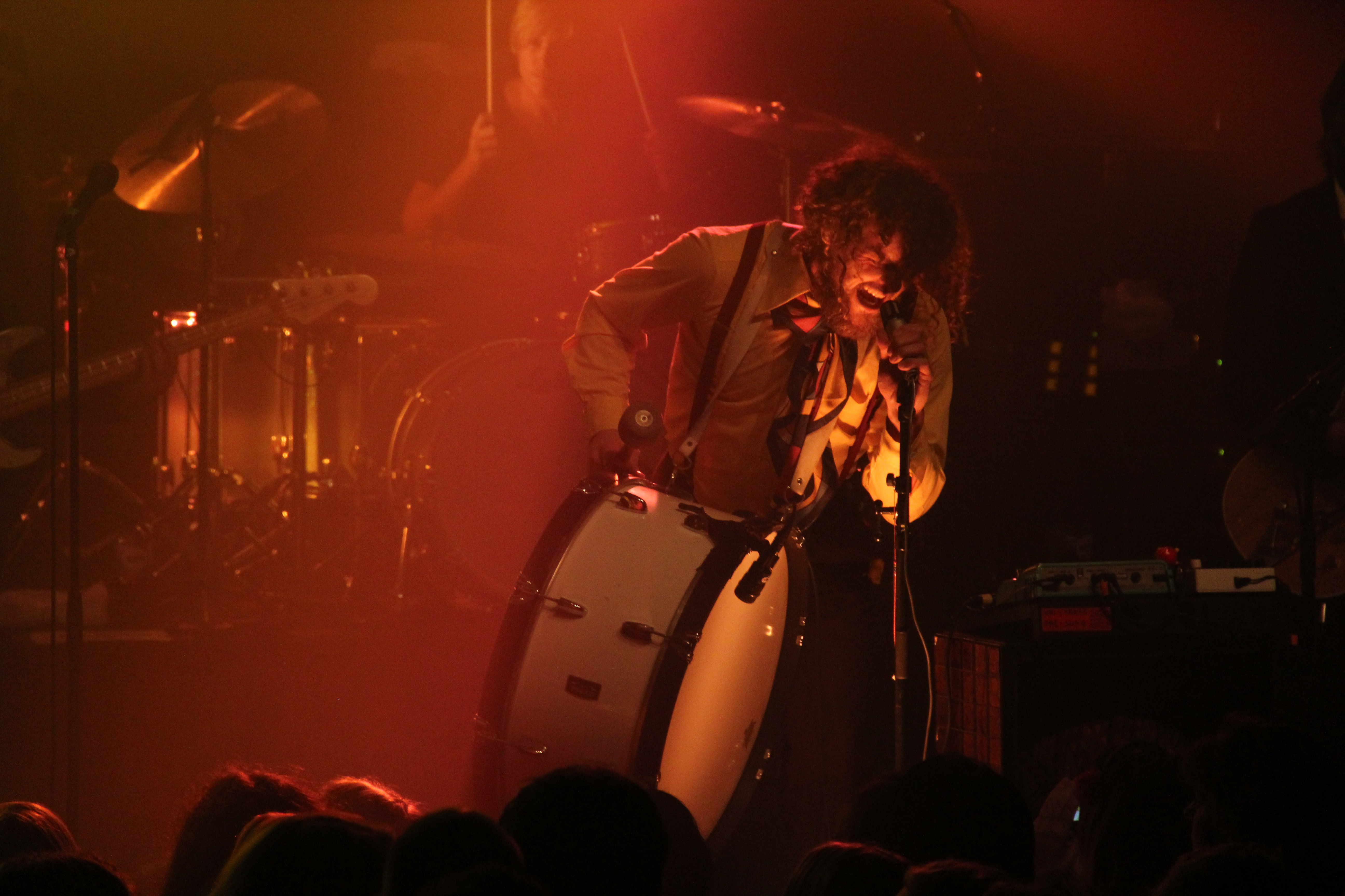 Leadzanger Marcel Veenendaal van Di-rect tijdens een optreden bij Poppodium Apollo 2012